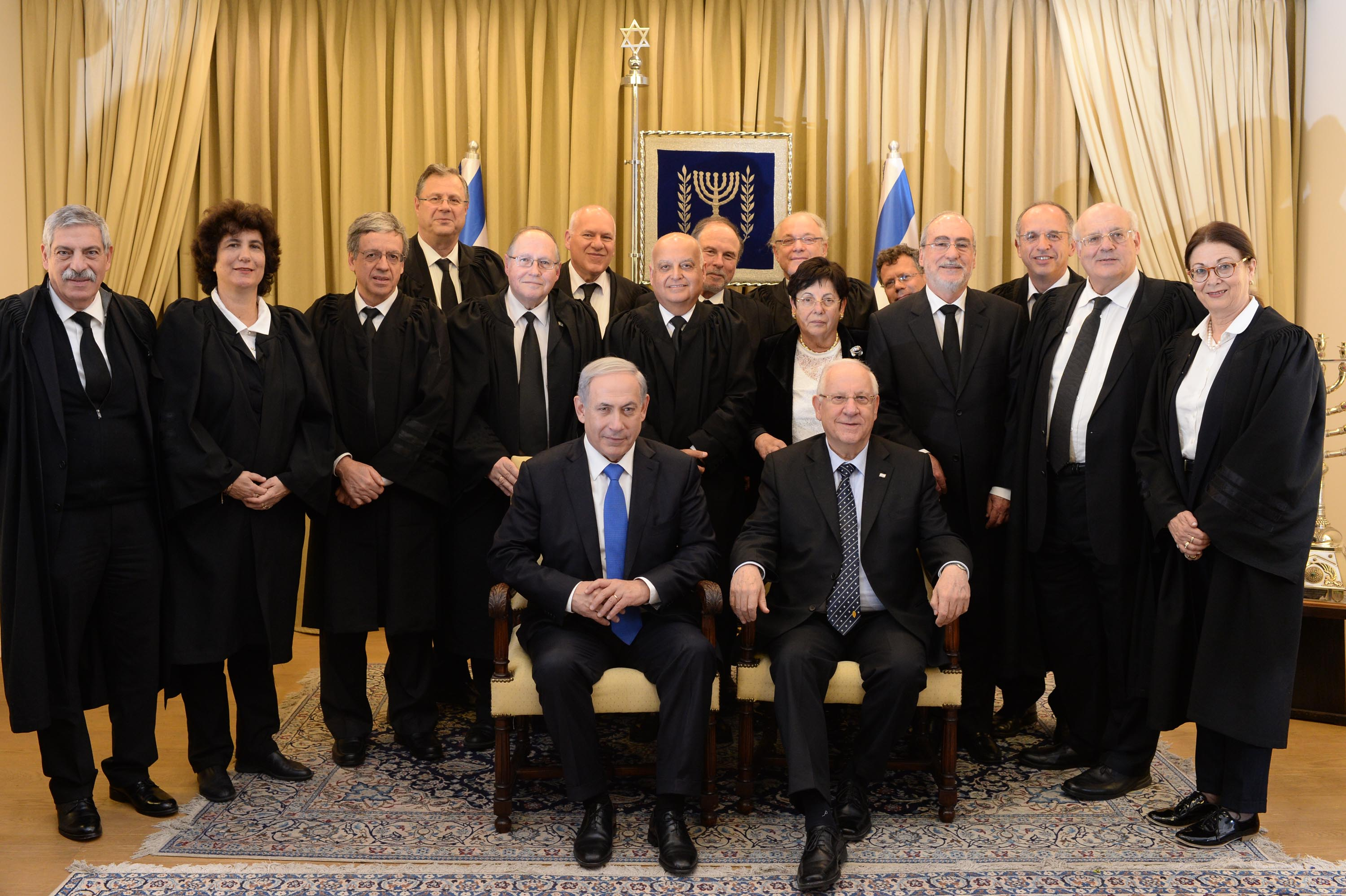 טקס השבעת נשיאת בית המשפט העליון, השופטת מרים נאור, בבית נשיא מדינת ישראל ראובן ריבלין.